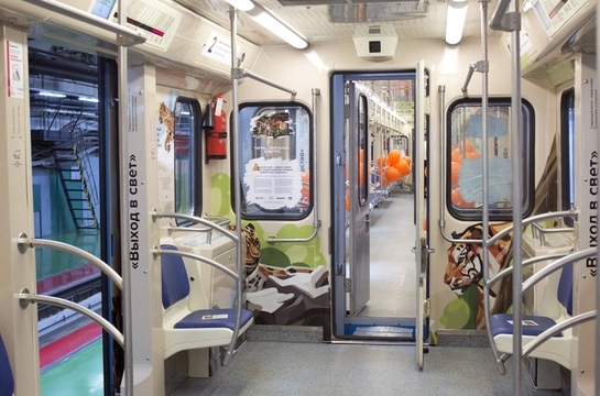 Электропоезд метро 81-760/761 "Полосатый экспресс-2" в депо. Концевая часть салона с открытыми межвагонными дверями. Видны изображения леопарда и тигра